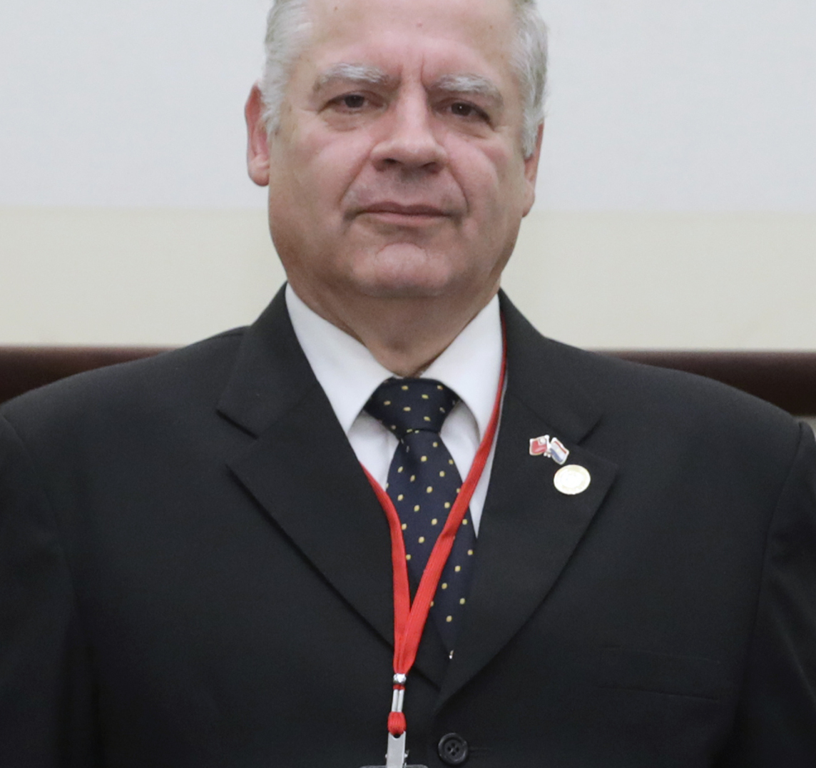 巴拉圭共和國最高法院院長貝尼德斯（Luis María Benítez Riera）伉儷應邀出席雙十國慶活動並進行訪問。